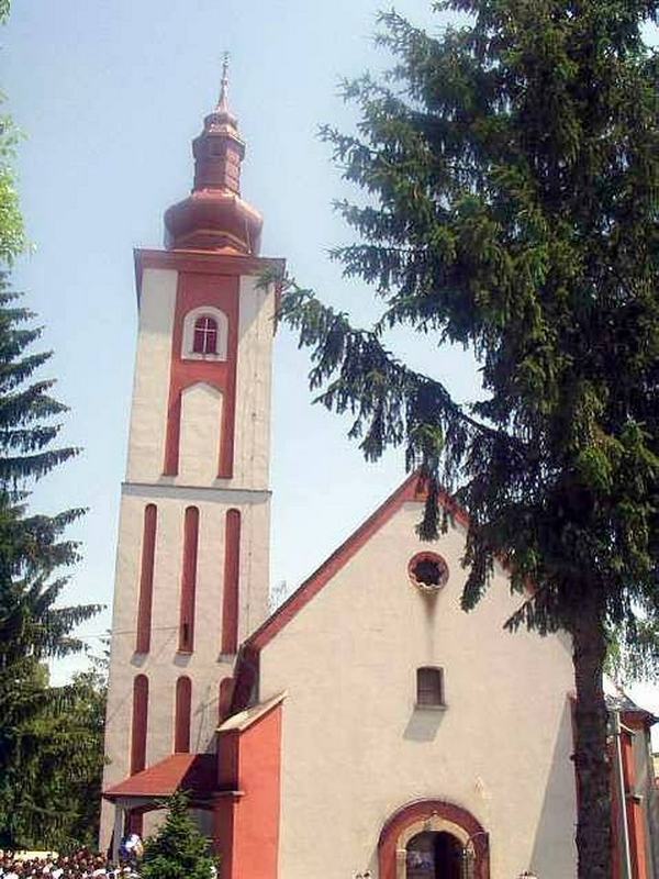 Dubrava - Crkva Sv.Margarete Enface (Anfas)